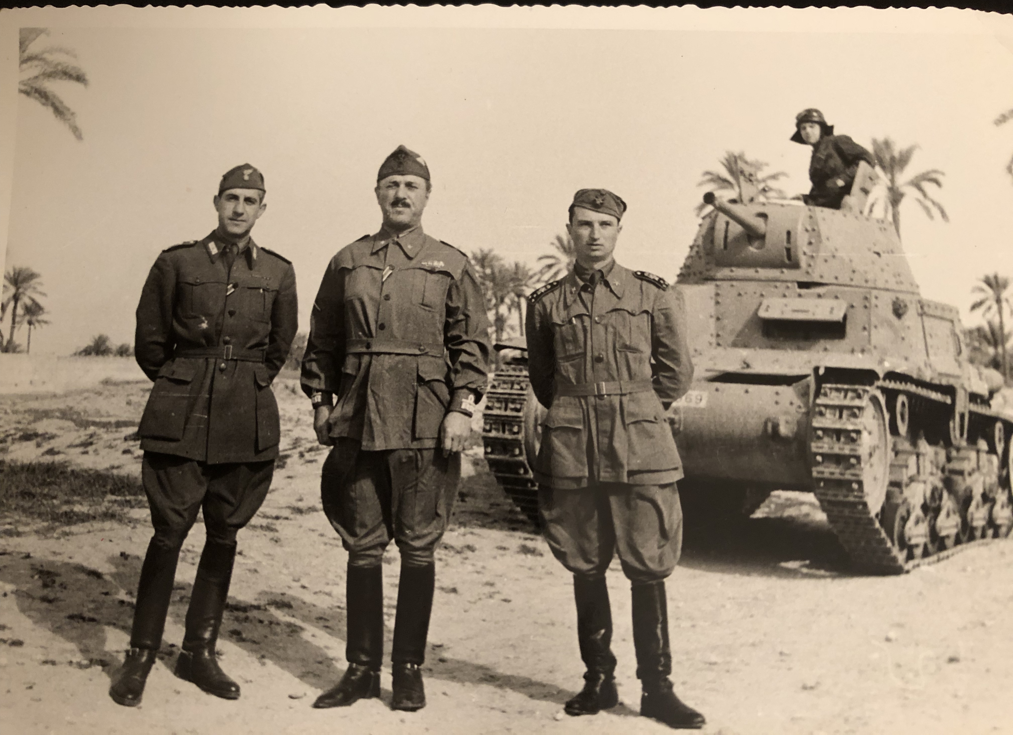 M Balotta